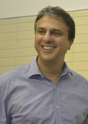 O governador Camilo Santana em julho de 2015.